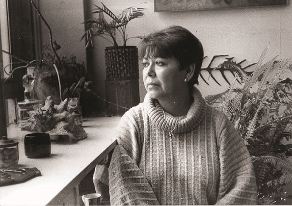 Fotografía de la pintora mexicana Herlinda Sánchez Laurel Zúñiga.